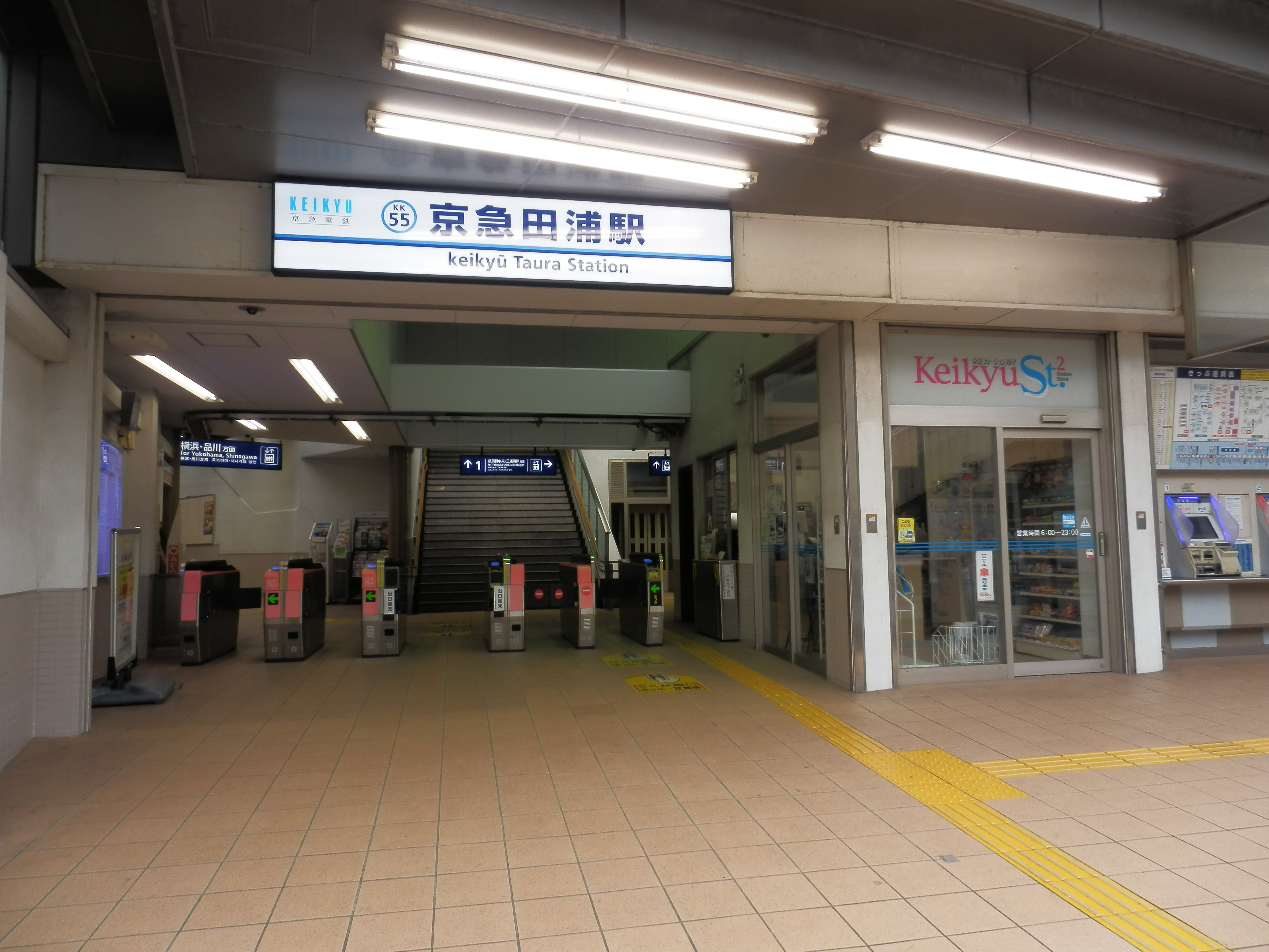 京急田浦駅改札口